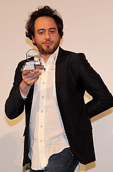 Giuseppe Gagliardi